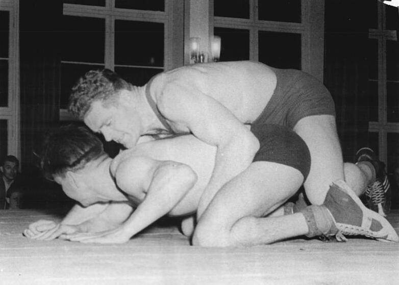 Maier, Albrecht Zentralbild Köhne 12.4.1959 SC Motor Zella-Mehlis Deutscher Mannschaftssieger Deutscher Mannschaftsmeister im klassischen Stil wurde am 11.4.1959 im Clubhaus Des VEB Fahrzeug- und Gerätewerk Simson Suhl durch einen Sieg über SC Lok Leipzig die Mannschaft vom SC Motor Zella-Mehlis. UBz: Maier (SC Lok Leipzig) unterlag den Deutschen Meister Albrecht (SC Motor Zella Mehlis).